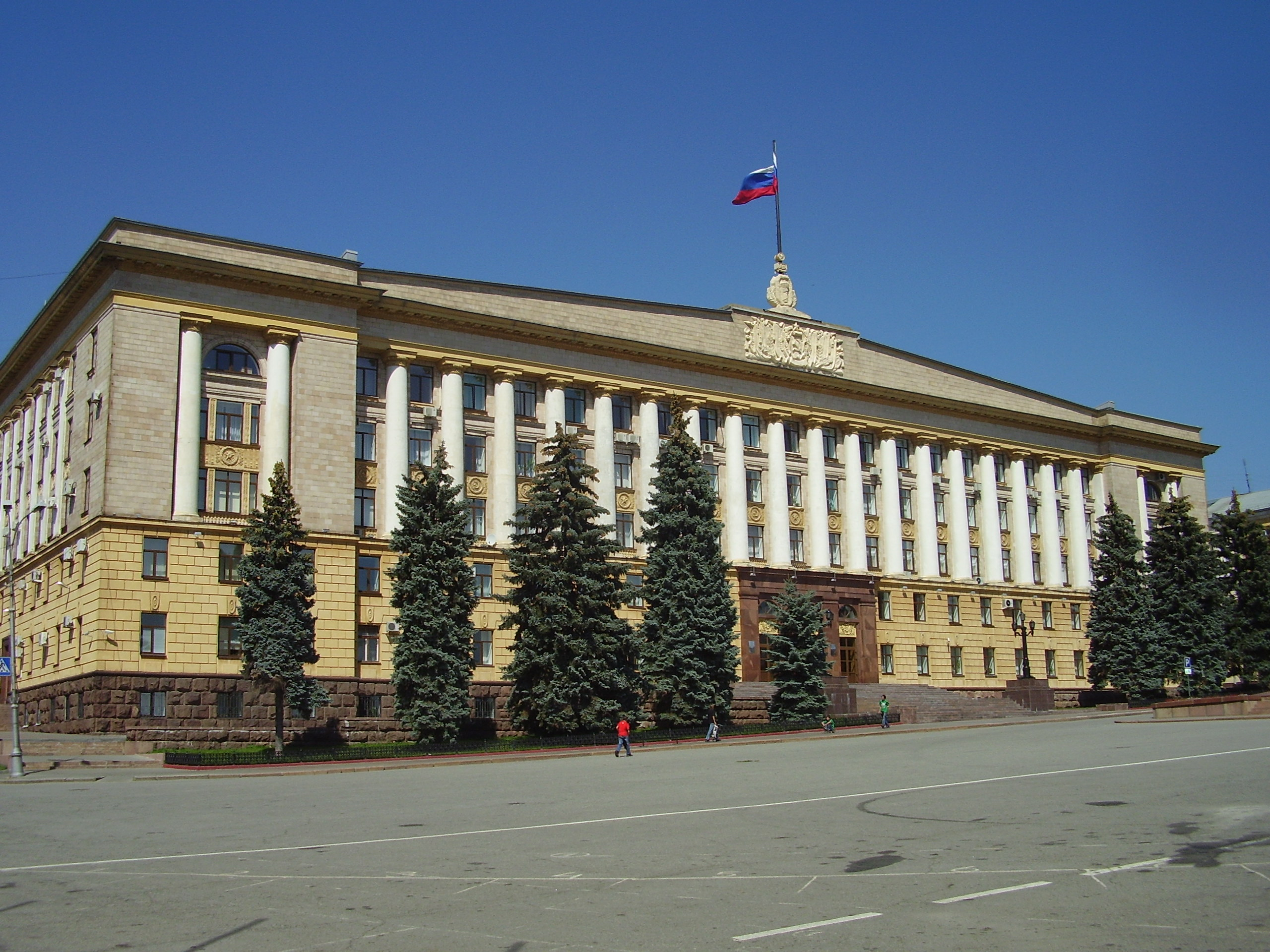 Липецк,здание администрации.